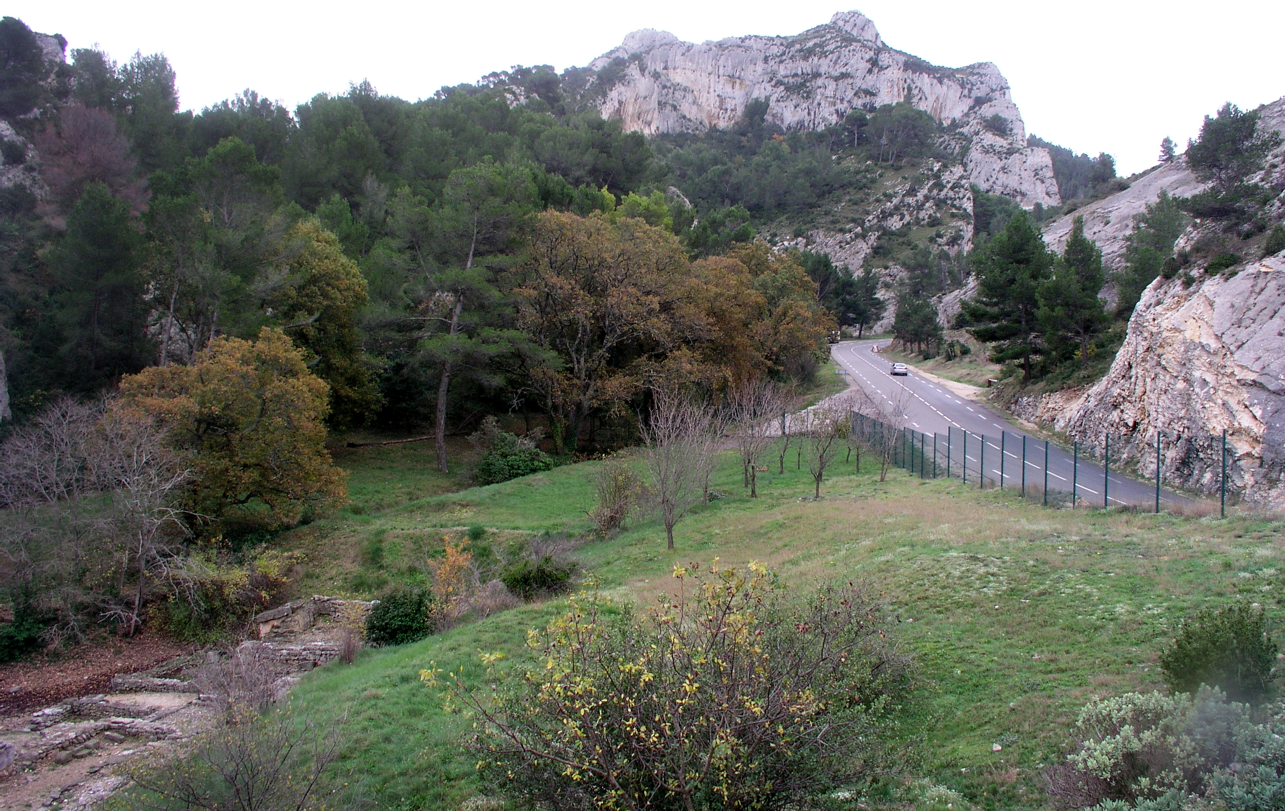 La route de Maussane (D 5) qui coupe le site antique de Glanum en deux (Saint-Rémy-de-Provence).